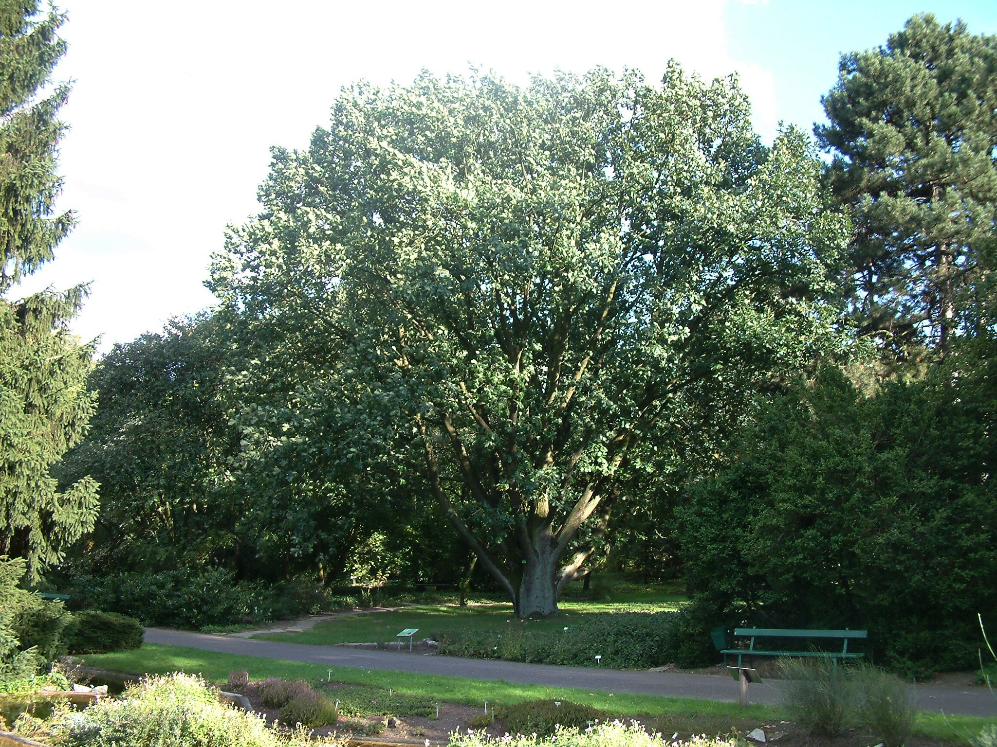 Quercus frainetto, Botanical Garden in Poznań